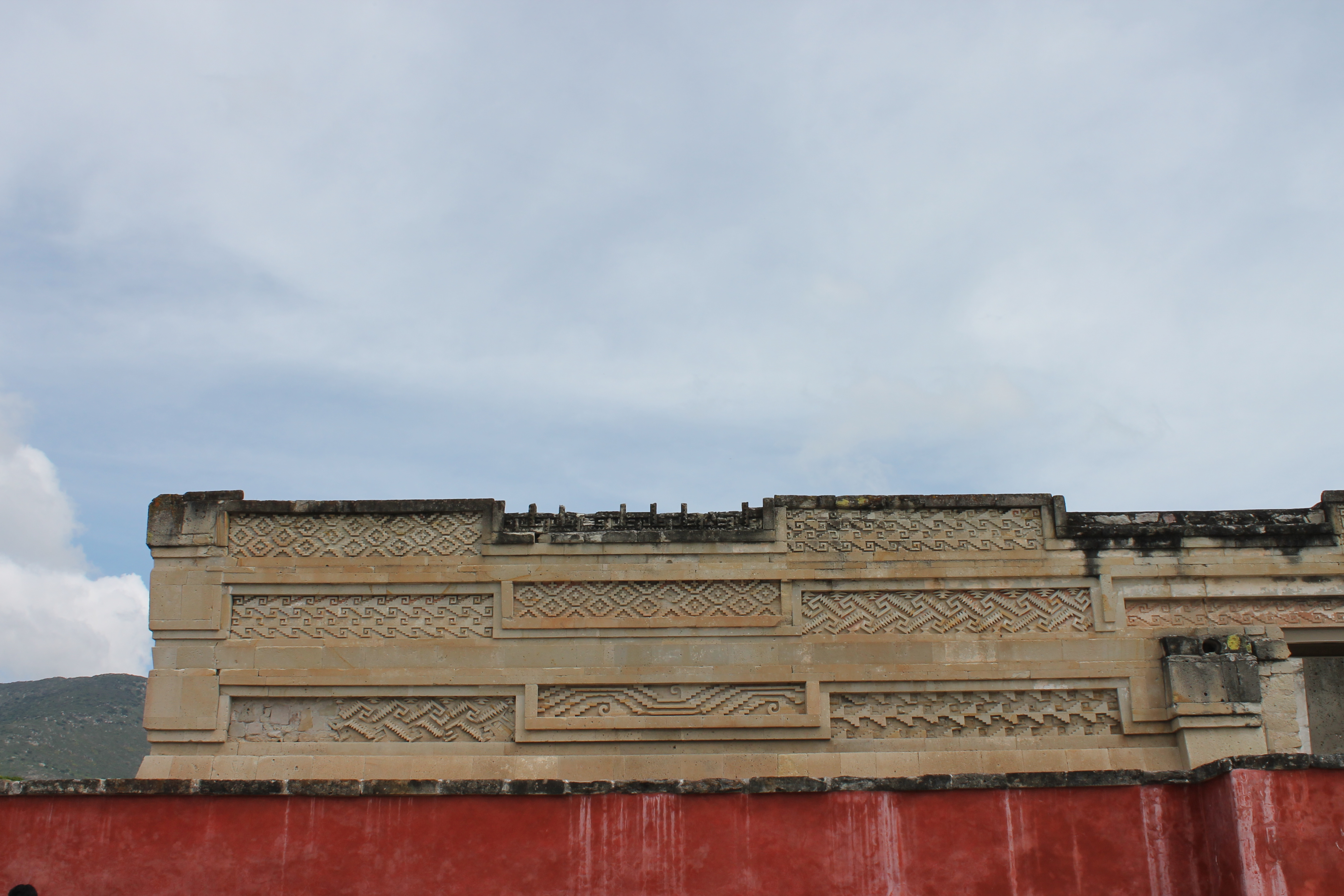 Se muestra un acercamiento de una agrupación de grecas ubicadas en uno de los muros circundantes del Salón de las Columnas. En la parte inferior se aprecia estuco pintado de rojo.